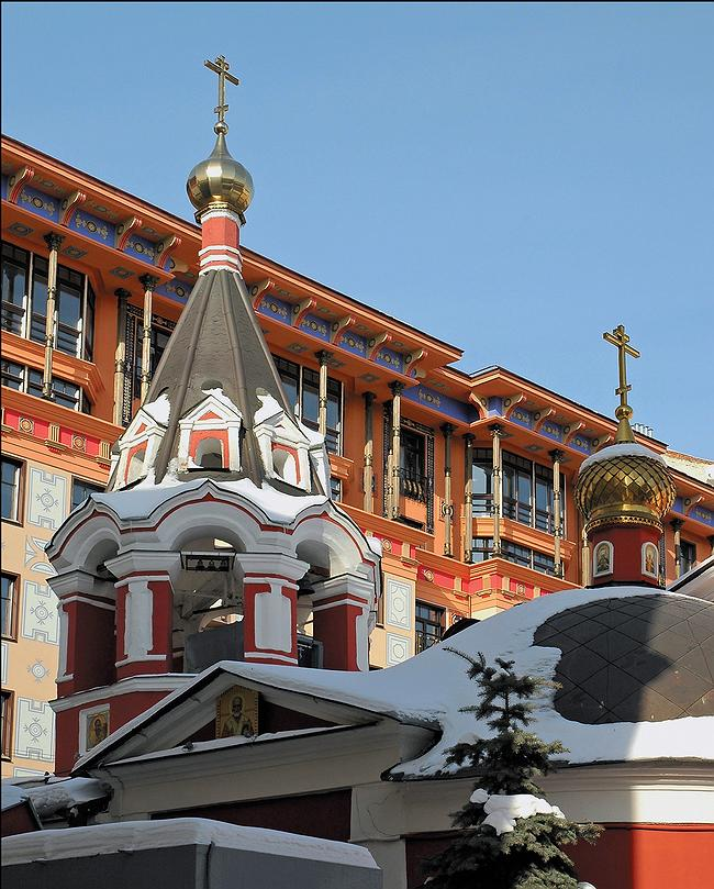 Помпейский дом был снят мною со стороны Афанасьевского переулка